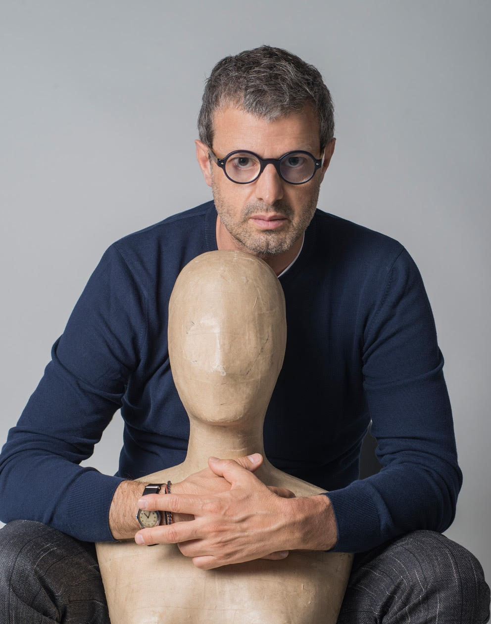 Ritratto Vittorio Camaiani